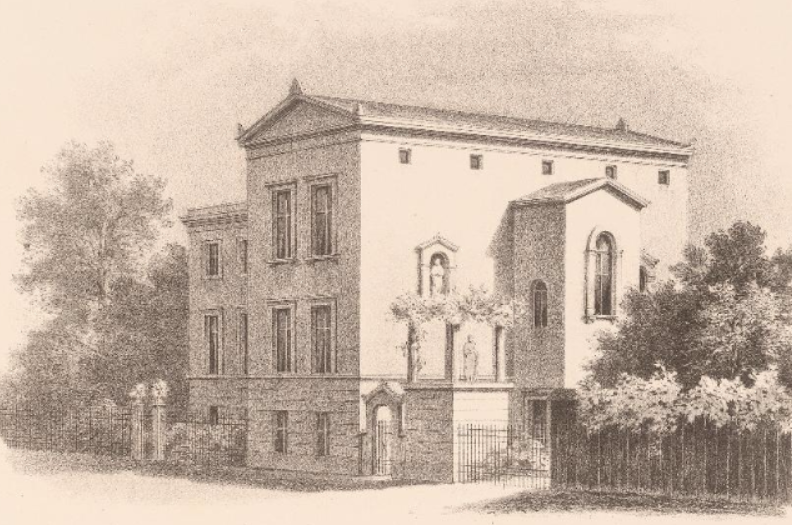 Poczdam, Villa Gottgetreu